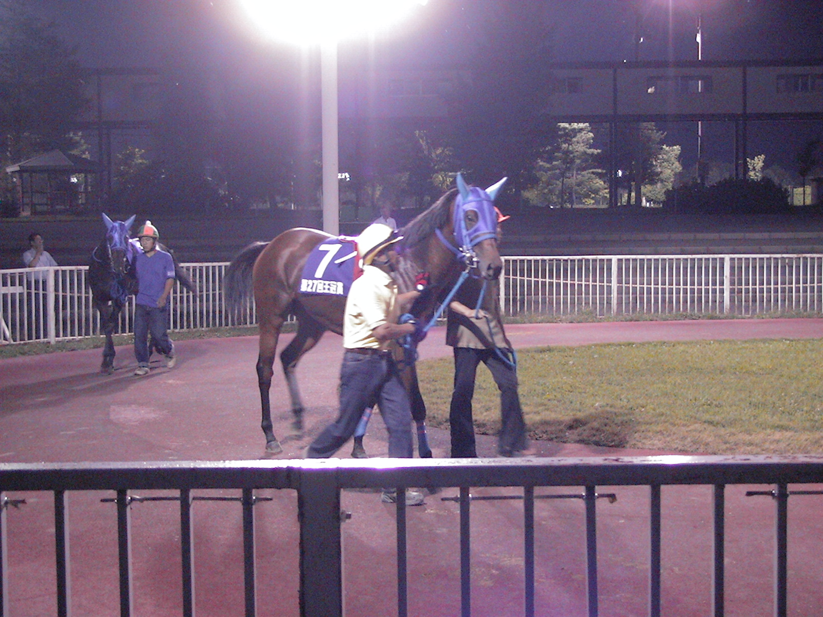 アヤパン (競走馬)。旭川競馬場パドック (王冠賞の時)